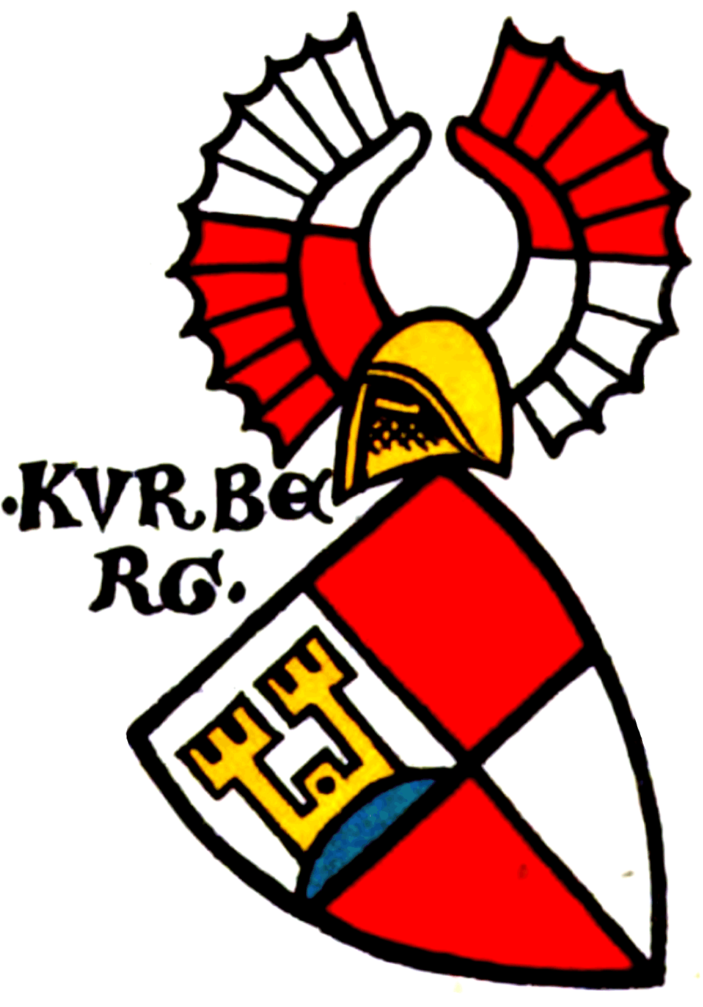 Wappen der Burgberg (Kurberg) Nr 407